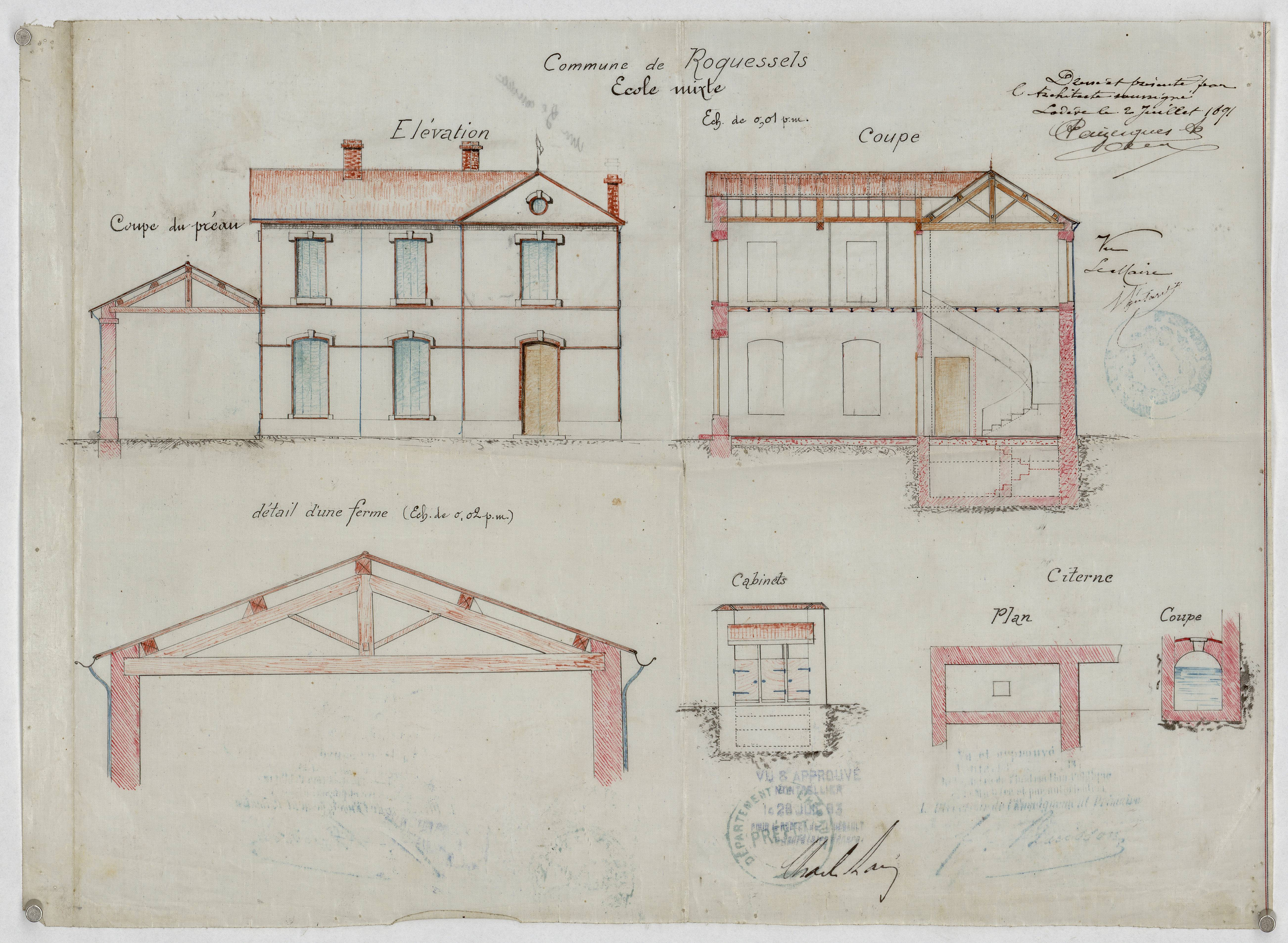 Roquessels. - École mixte, construction : plan, élévation, coupe